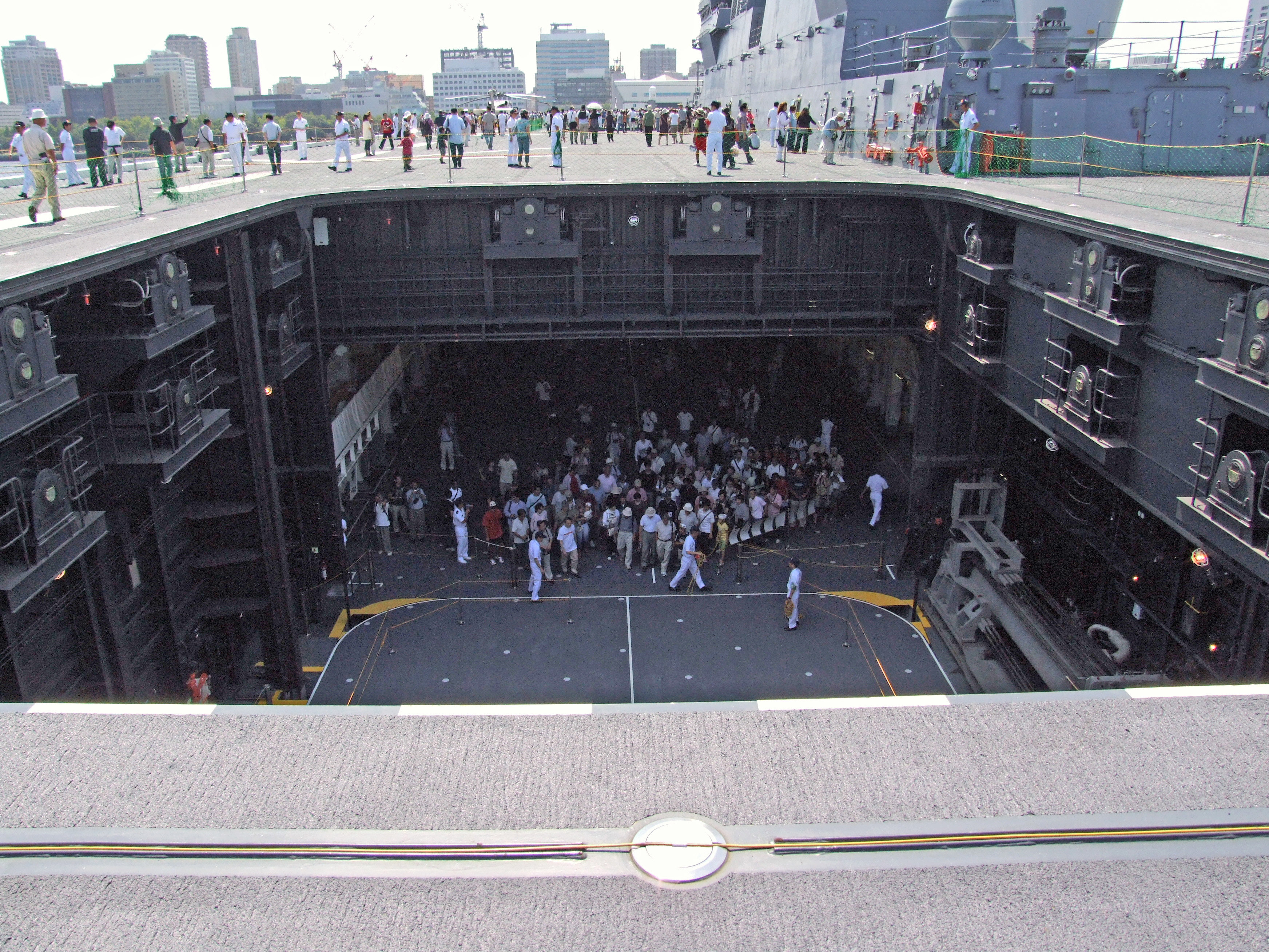 護衛艦ひゅうがの後部昇降機（2009年横浜港開港150年での艦内開放にて撮影）